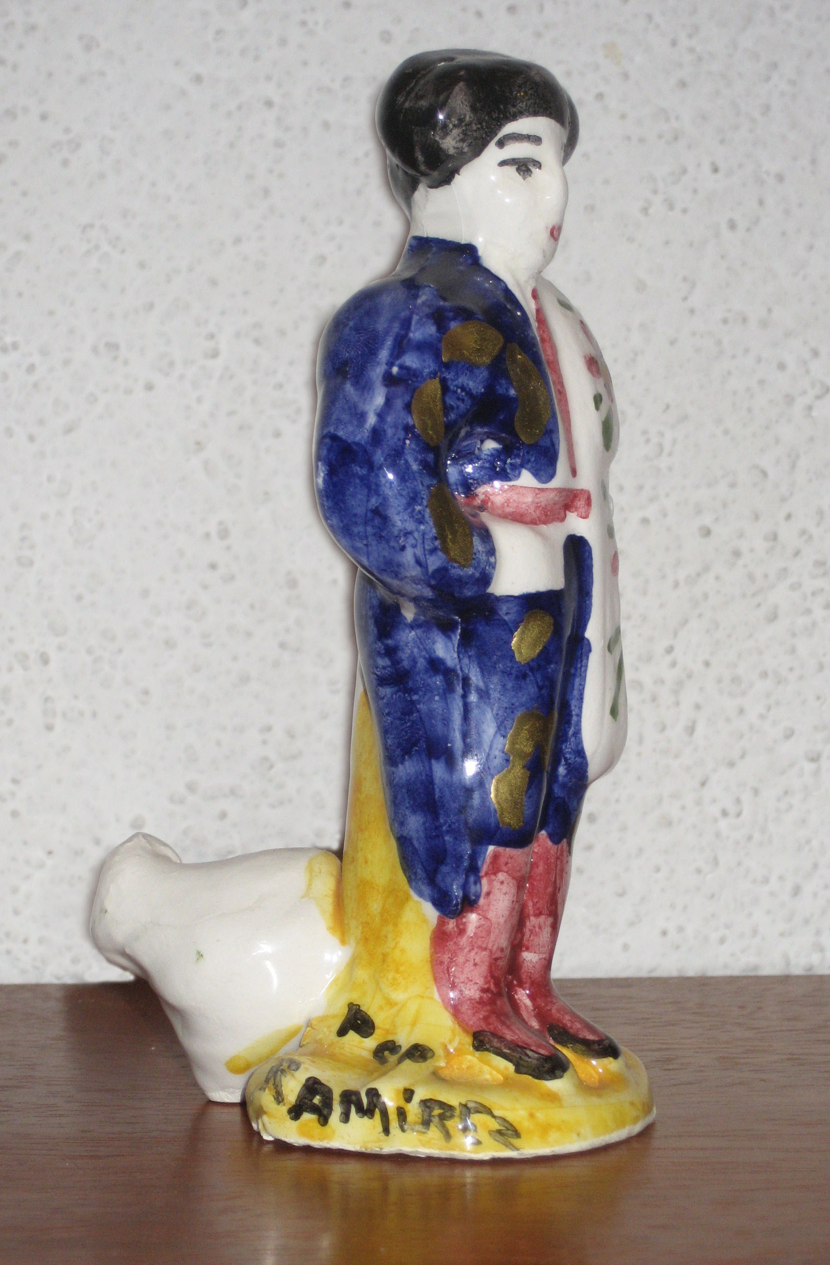 Pito de las fiestas de Santa María de la Cabeza, realizado por el alfarero Pepe Ramírez de Ándujar (Jaén) Spain.